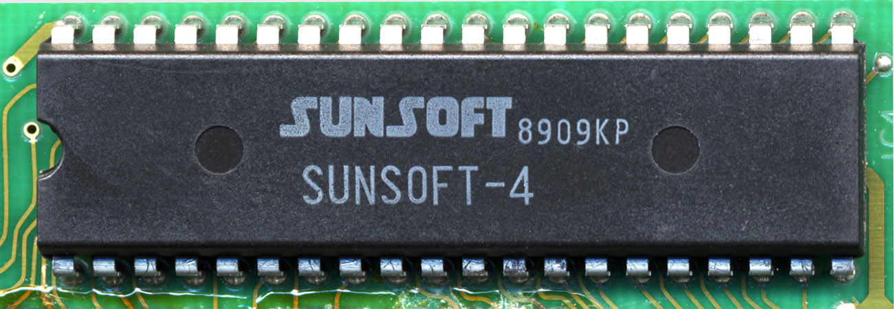 ファミコンカートリッジ サン電子 「なんてったって!!ベースボール」に実装されているSUNSOFT-4